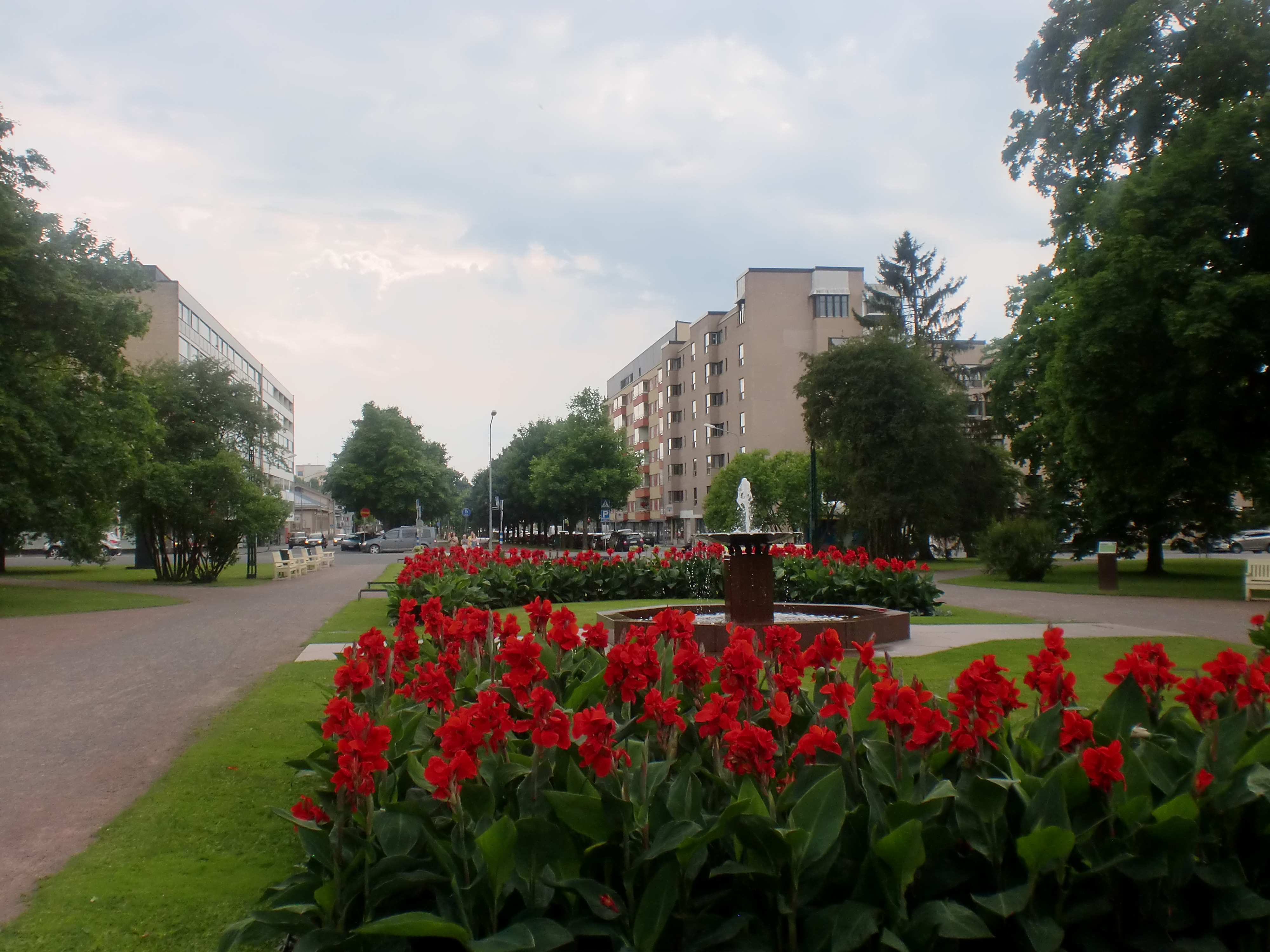 Raatihuoneenpuisto; puistoalue Porissa